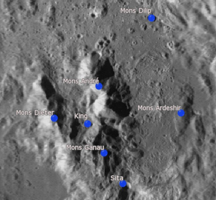 Cráter lunar King. Montes den su interior. (Imagen LRO)